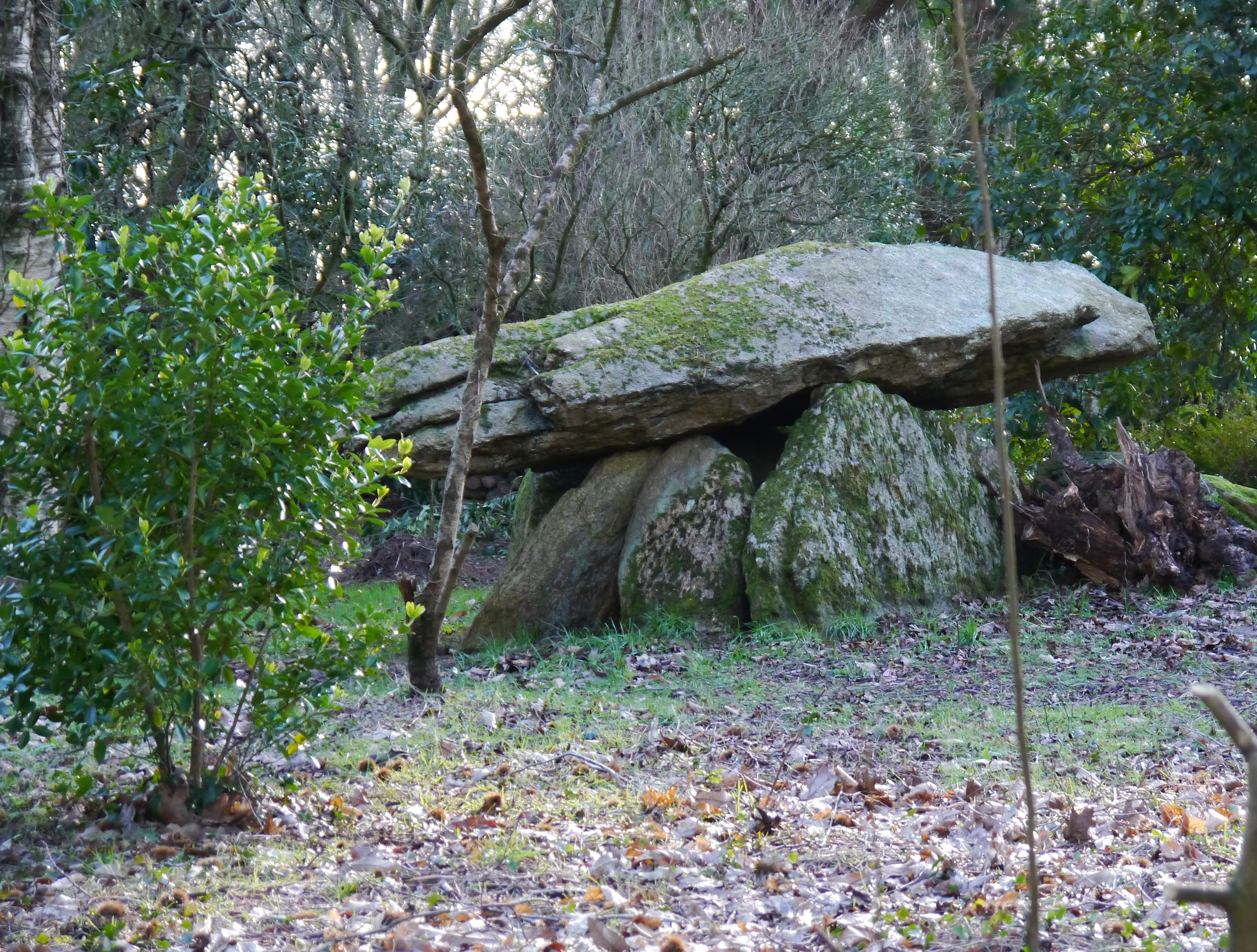 Quimperlé le Dolmen de Roscasquen est classé aux monuments historiques. Epoque de la construction : néolithique. Adresse : route de Pont-Scorff sur une propiété d'une personne privée. Référence Mérimée PA00090379